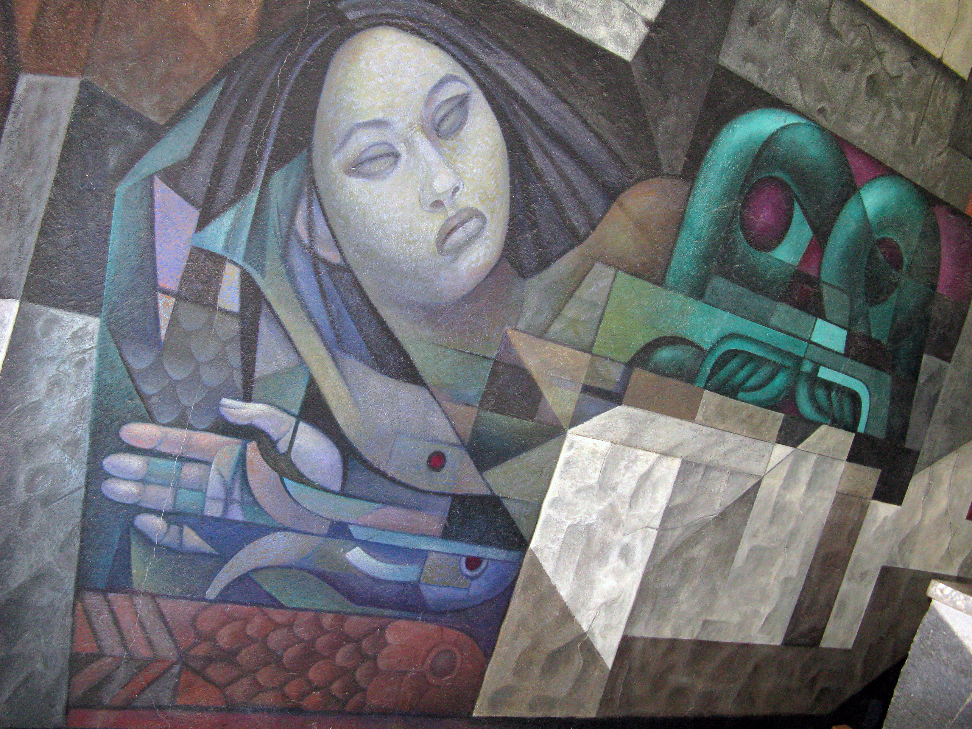 Parte del mural "Presencia de América Latina", ubicado en la Casa del Arte, Universidad de Concepción, Chile